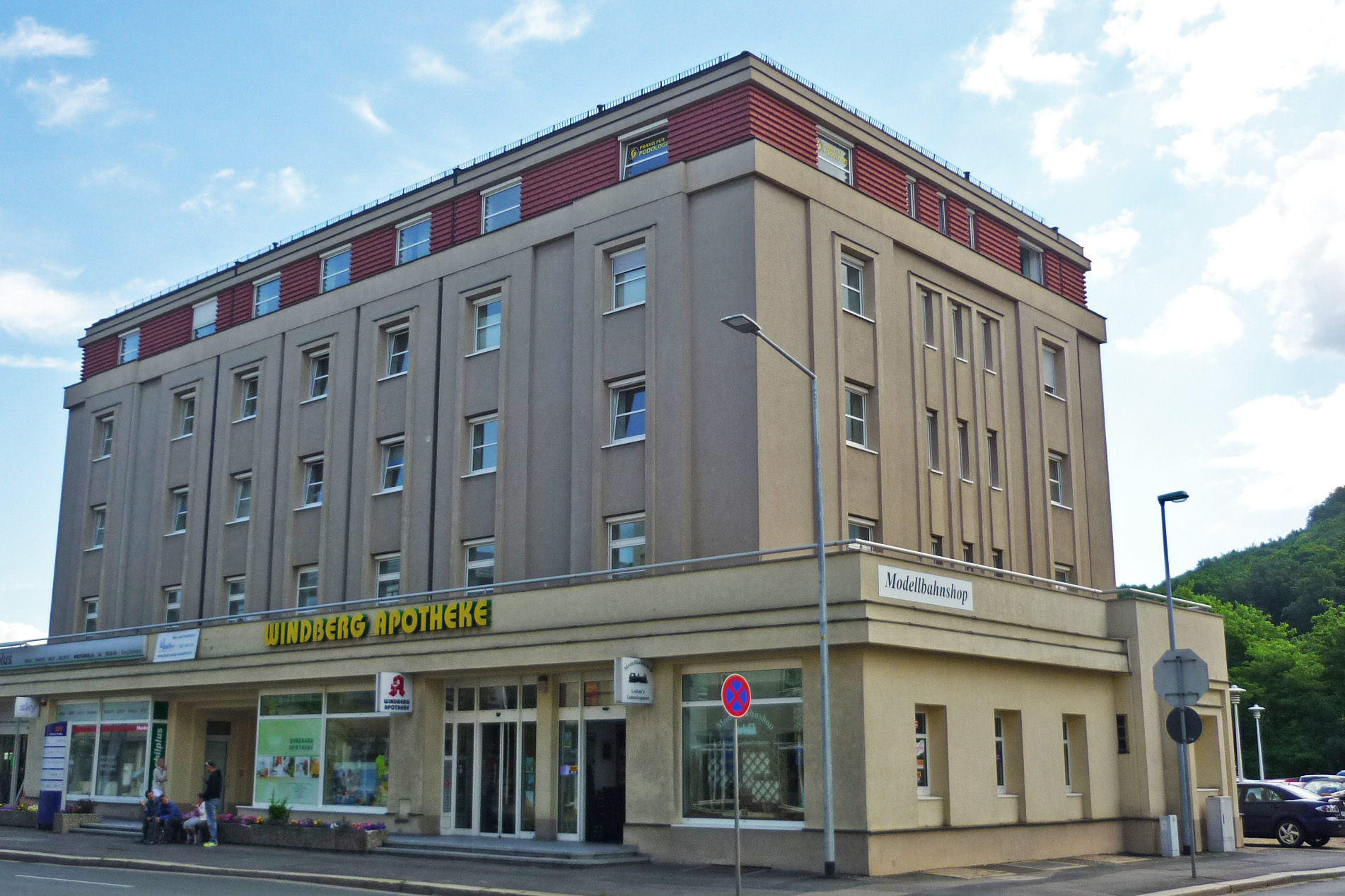 Gebäude Dresdner Str. 209 in Freital, erbaut 1928 als Stadthaus, Architekt: Rudolf Bitzan.